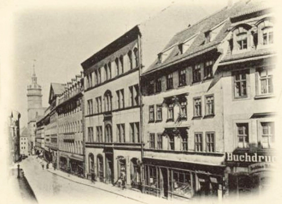 Das von Albert Geutebrück 1855/56 erbaute Beguinenhaus (hohes Gebäude) in der Leipziger Universitätsstraße, abgerissen 1892